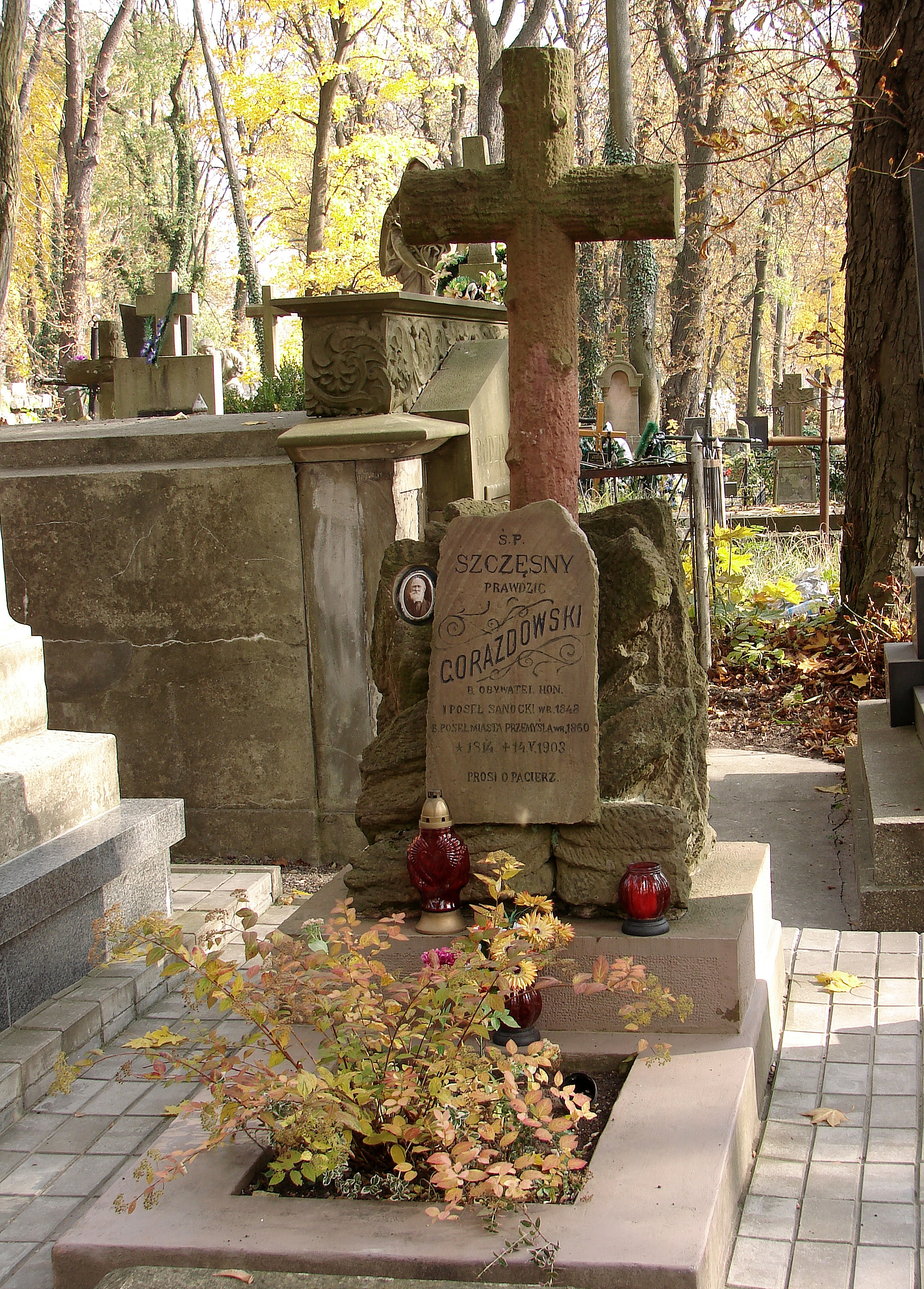 Пам'ятник на могилі Щ. Гораздовського.Личаківський цвинтар , поле № 73.